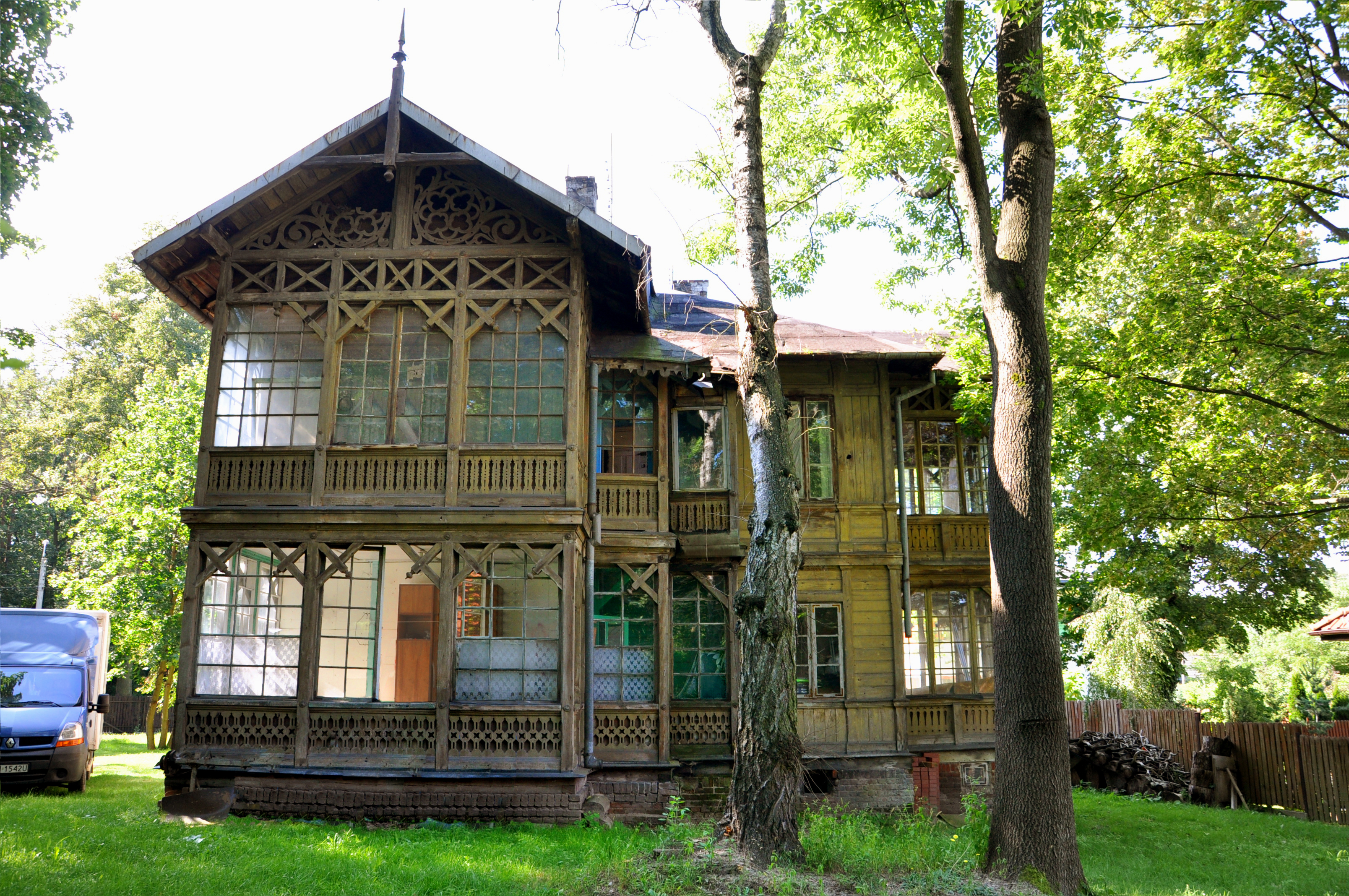 Warszawa ul. Fletniowa 2 - willa letniskowa (zabytek, nr rejestr. A-898 z 22.01.20)